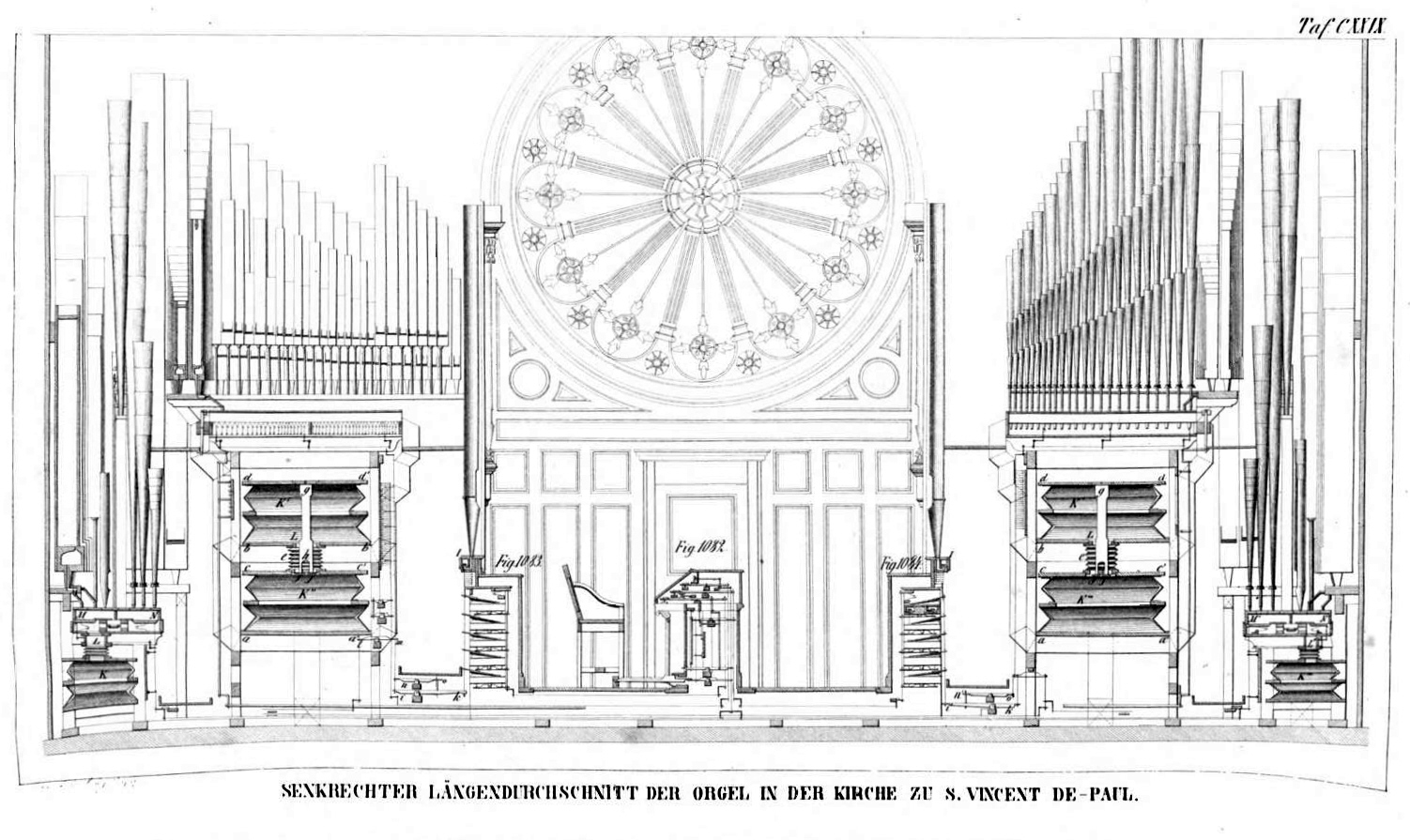 Tafel aus Johann Gottlob Töpfer: Atlas zum Lehrbuch der Orgelbaukunst, Weimar 1855Tafel 129, Senkrechter Längendurchschnitt der Orgel in der Kirche zu St. Vincent-de-Paul